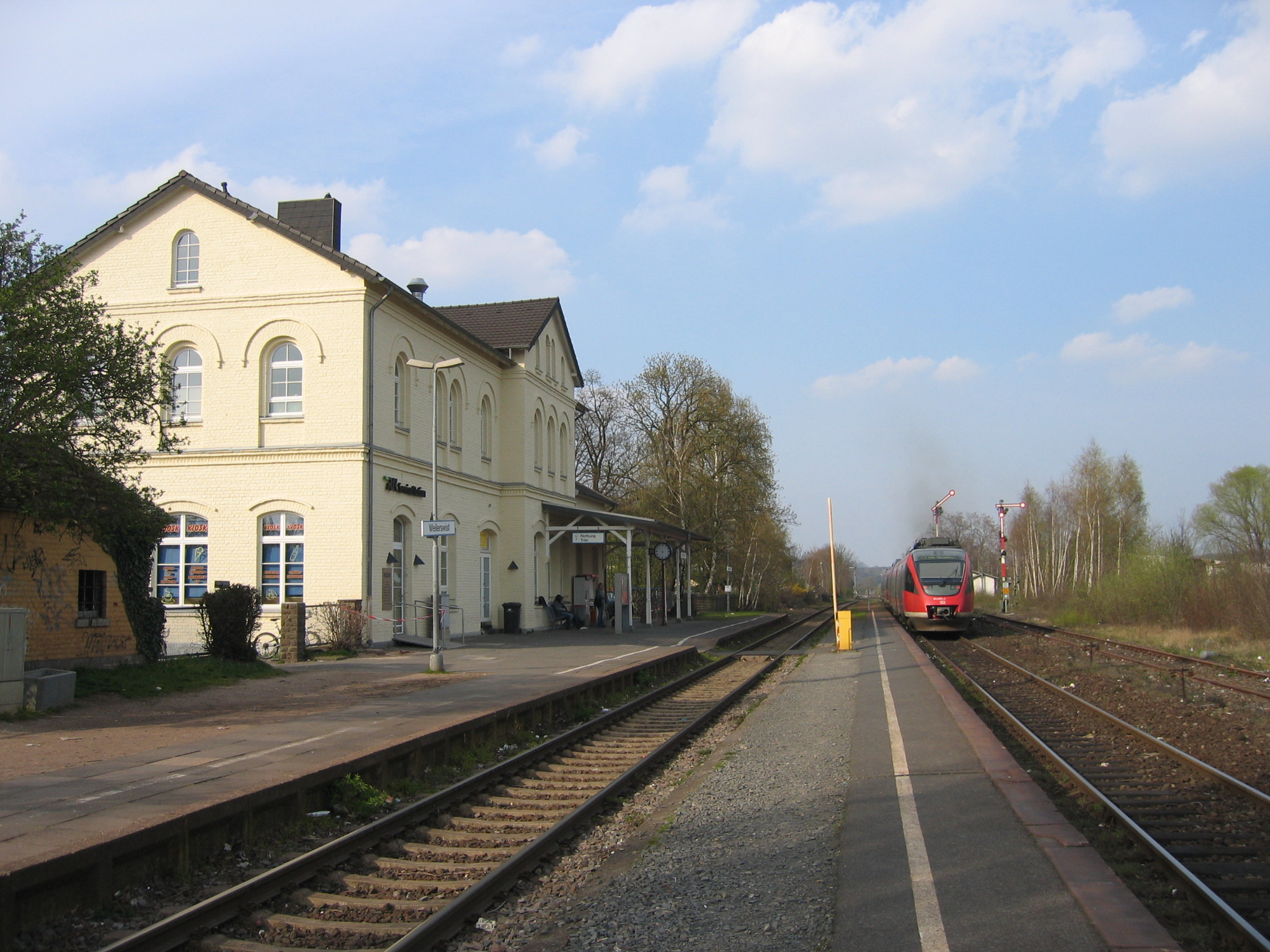 Bahnhof Weilerswist im Kreis Euskirchen